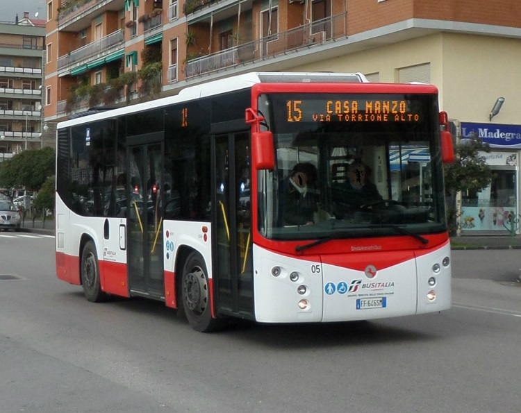 I nuovi Viva5 di BusItalia Salerno